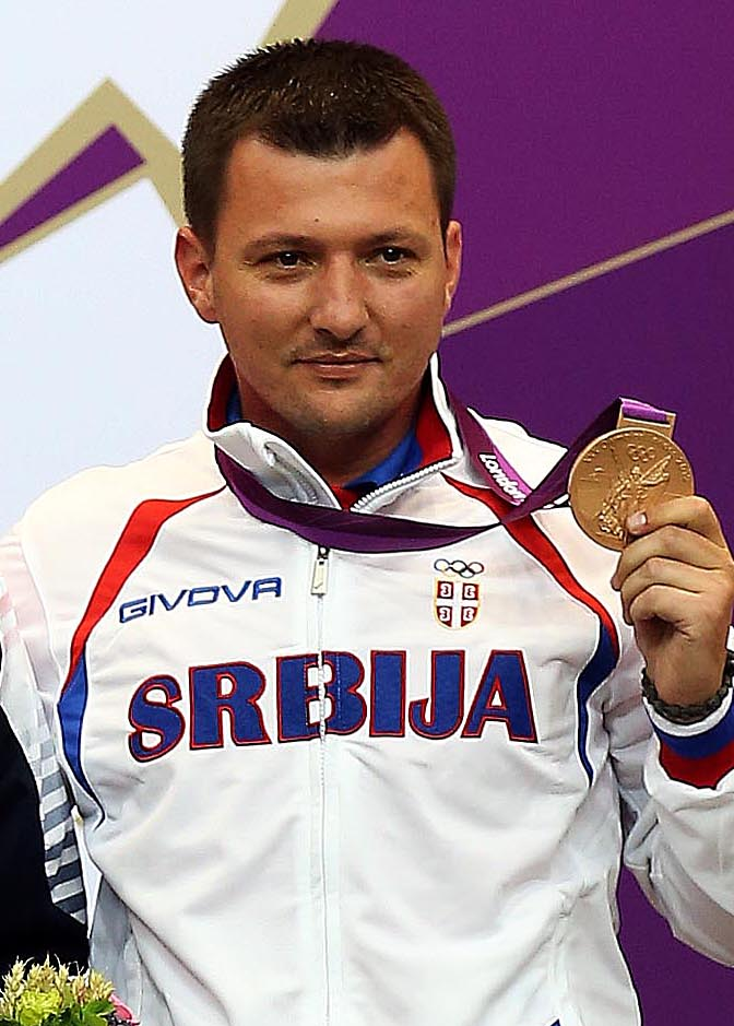 Andrija Zlatić, Serbian bronze medalist